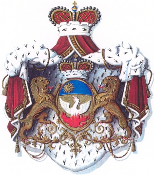 Герб князей Маврокордато.